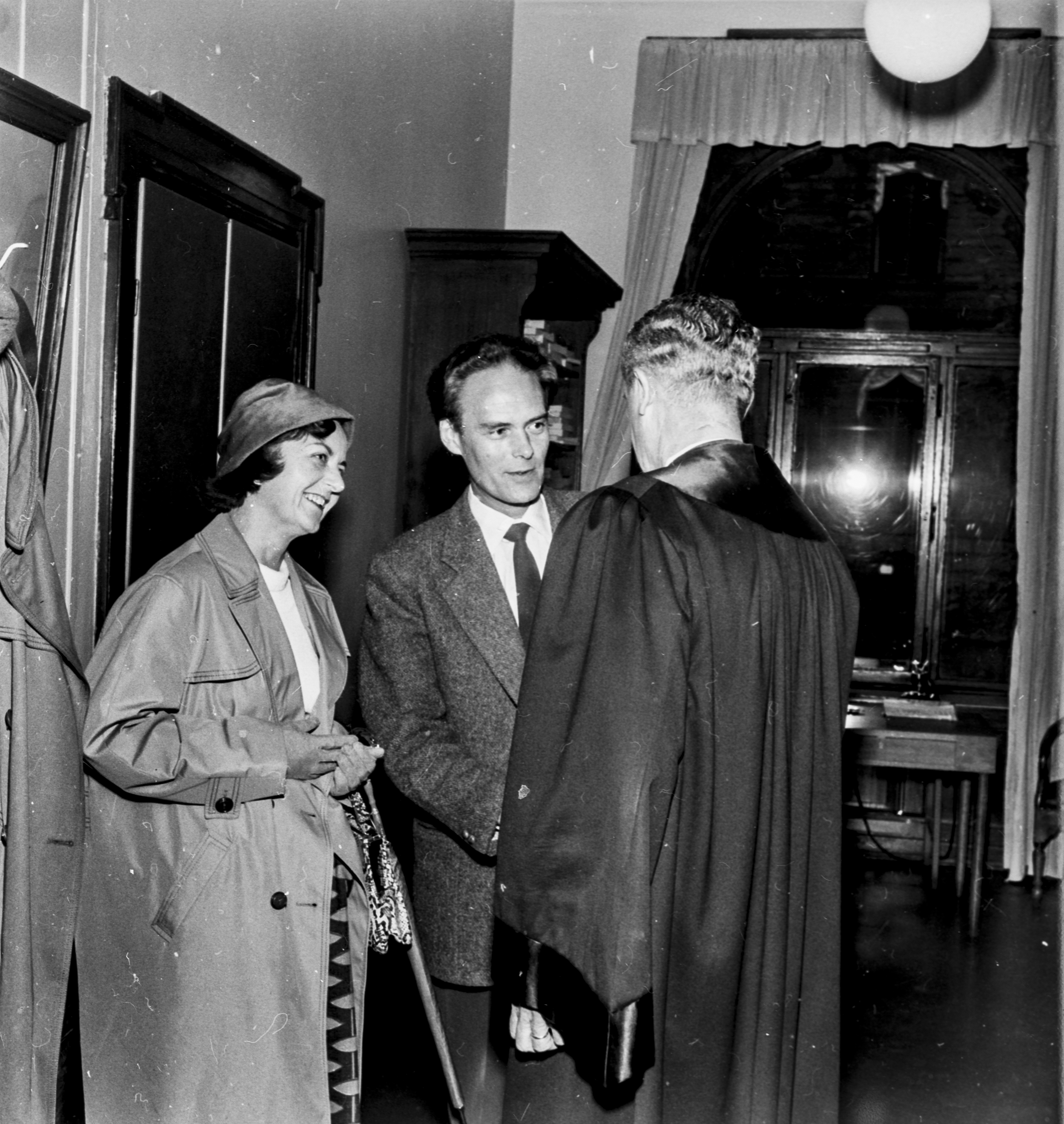 Bildet er hentet fra Arkivverket. Dommen i Høyesterett 1958 Arkivinstitusjon : Riksarkivet Arkivnavn : Billedbladet NÅ Sted : NORGE, Oslo, Oslo, Emneord: Rettsak, Litteratur, Forfattere Avbildet